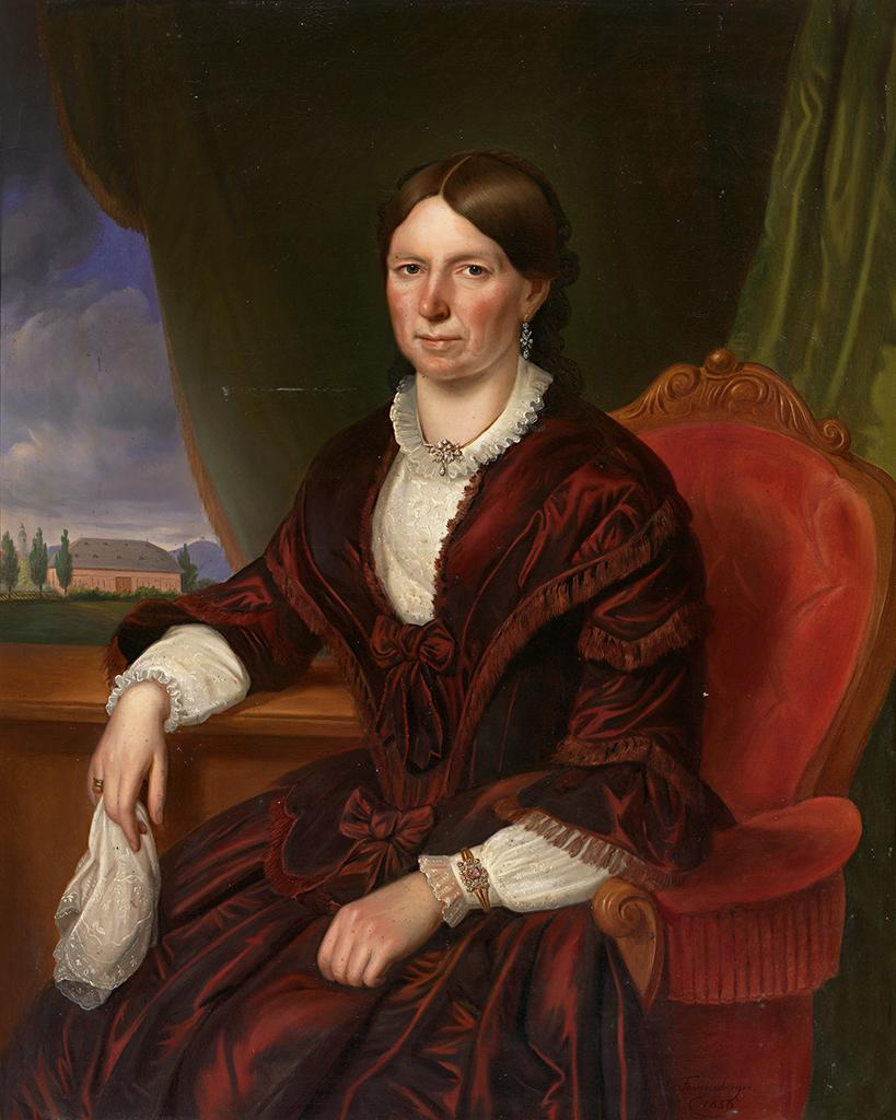 Portrait einer Dame vor Landschaftshintergrund